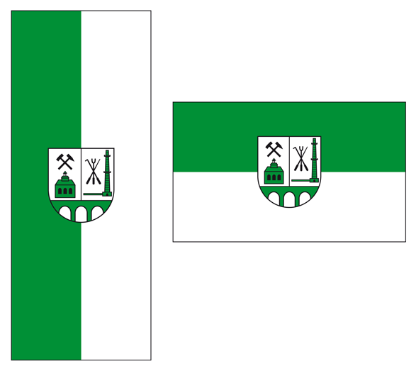 Flagge der Gemeinde Halsbrücke Flaggenbeschreibung „Die Flagge von Halsbrücke ist eine zweistreifige Flagge, deren linker (mastseitiger) Streifen grün und deren rechter Streifen weiß bei der längsgestreiften Flagge sind (1:1). Bei der quergestreiften Flagge ist der obere Streifen grün und der untere Streifen weiß (1:1). Mittig aufgesetzt ist das Wappen.“[1] Wappenbeschreibung „Gespalten in Silber über grünem Schildfuß mit drei bogenförmigen Durchbrüchen, vorn ein bedachtes grünes Haus mit drei bogenförmigen schwarzen Fensteröffnungen und zwei Dachreitern übereinander, darüber gekreuzt schwarze Schlägel mit Eisen; hinten ein ringförmig abgesetzter grüner Schornstein auf einem Sockel mit bogenförmiger schwarzer Öffnung und seitlich zum Spalt herausragender grüner Stab, zum Spalt beigestellt ein schwarzes Hüttengezähe (Kratze, Forkel und Stecheisen).“[1]